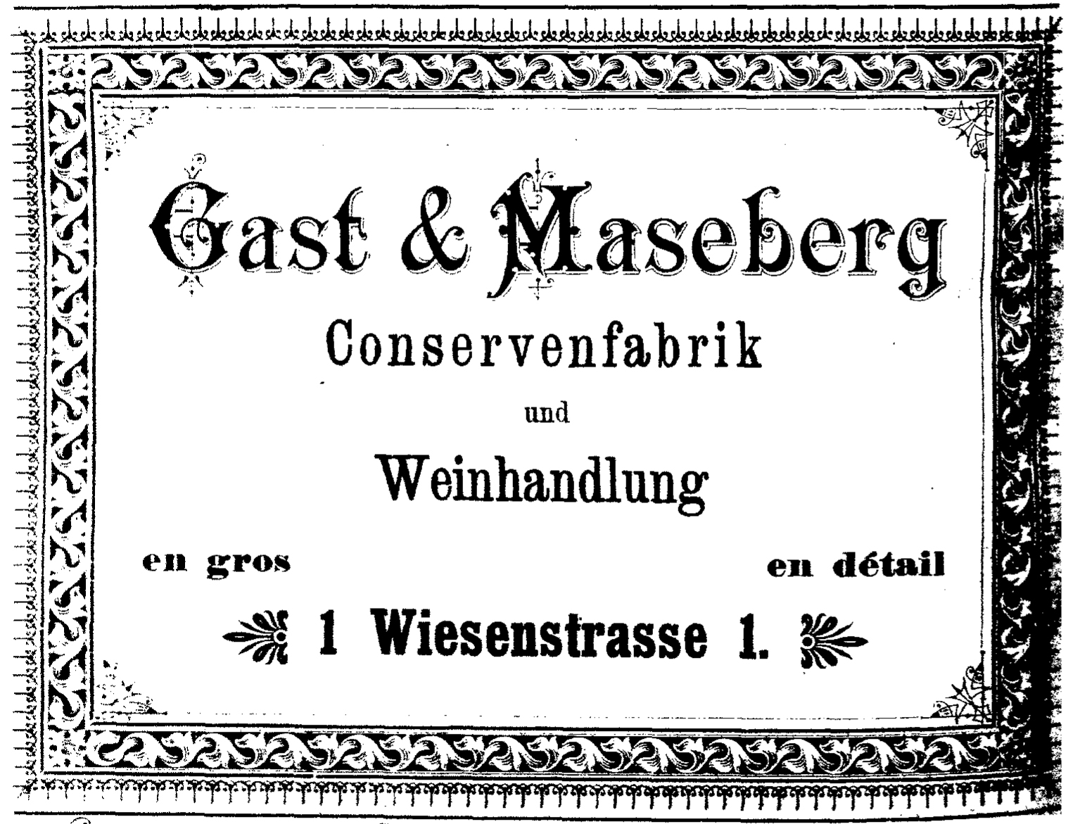 Werbeanzeige der Firma "Gast & Maseberg" von 1893